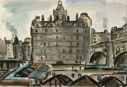 Photographie d'une aquarelle réalisée par Yvonne Guégan